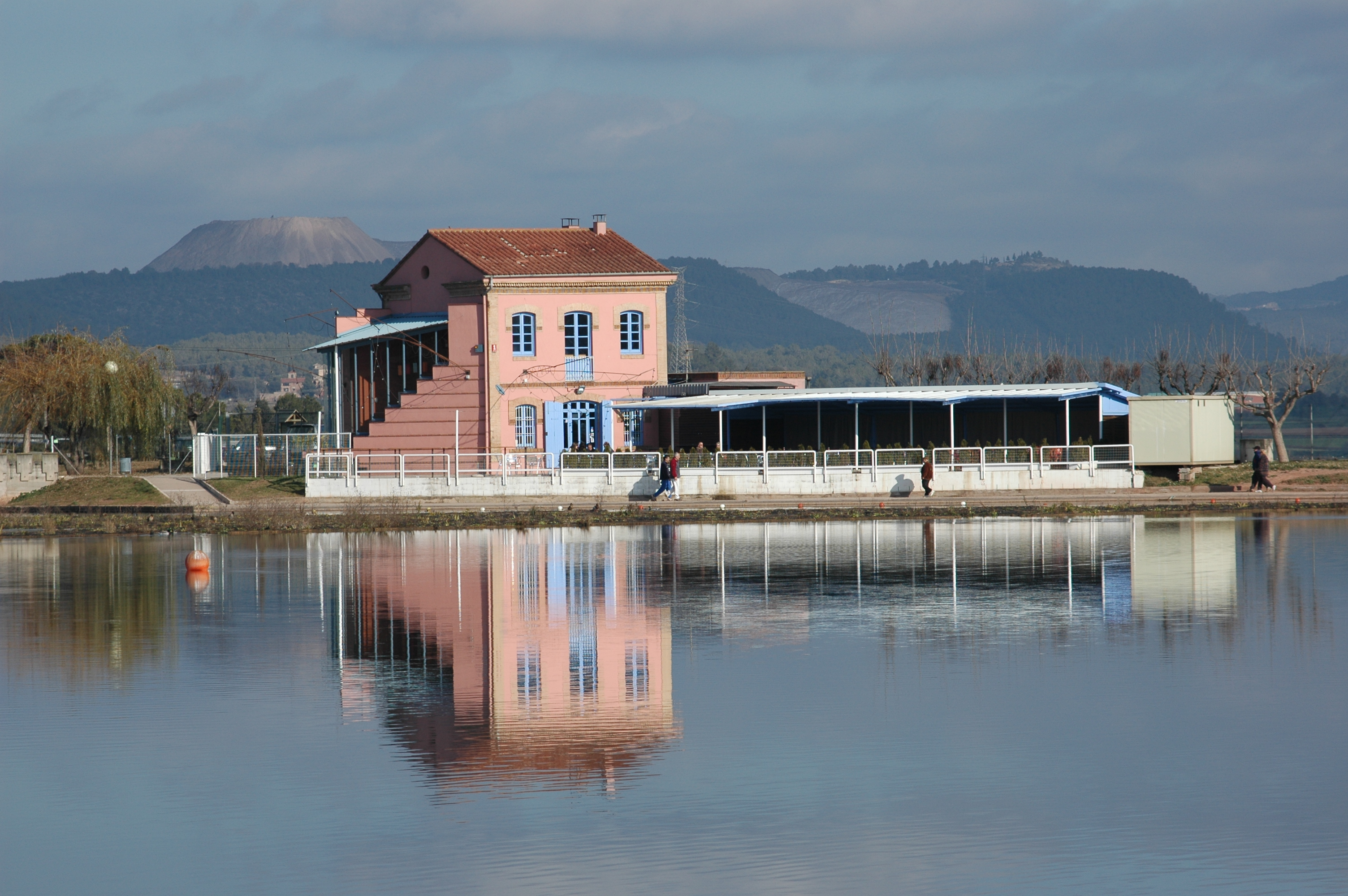 Vista del Parc de l'Agulla a Manresa, (Catalunya).